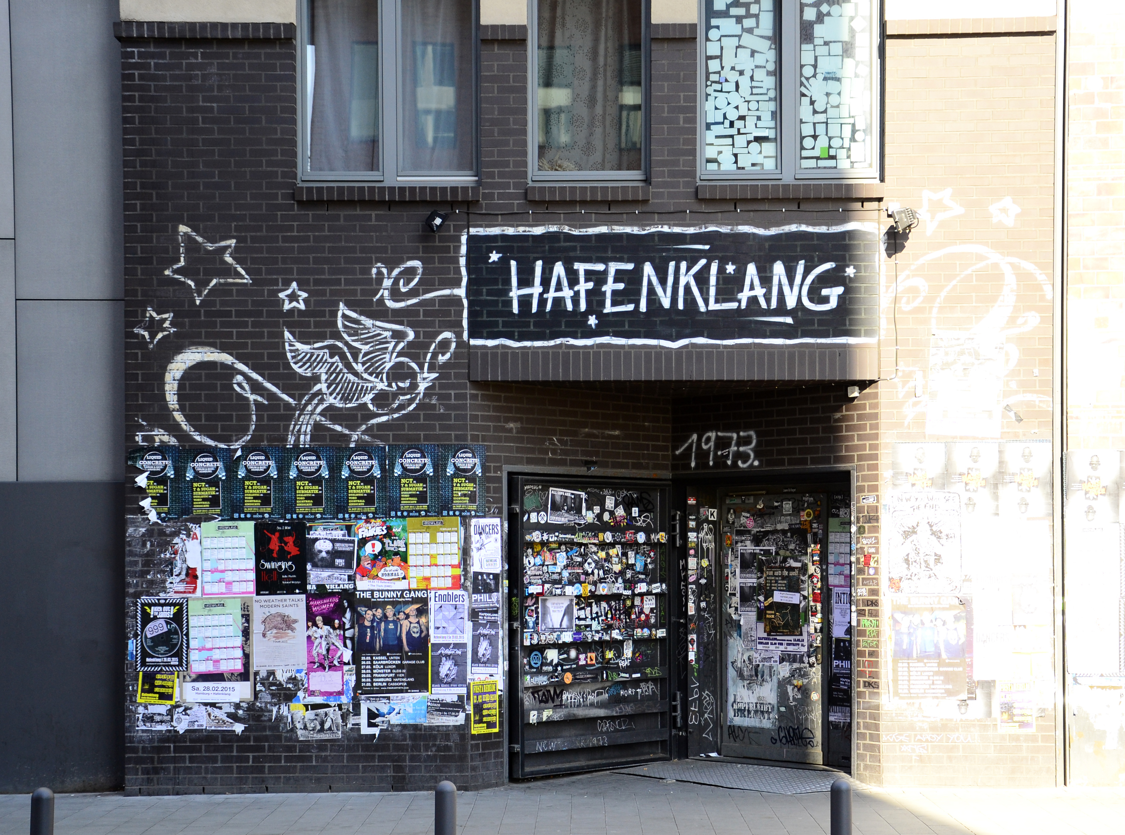 Der Eingang zum Hafenklang im Hamburg-Altona